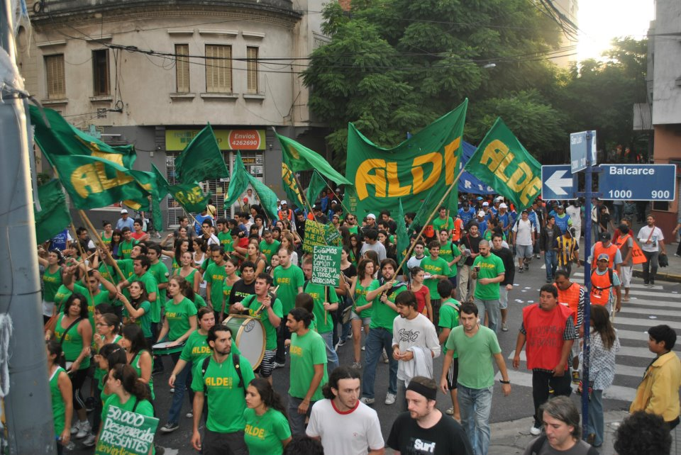 Movilización en Rosario el 24 de marzo de 2012 con motivo de un nuevo aniversario del Golpe de Estado de 1976.